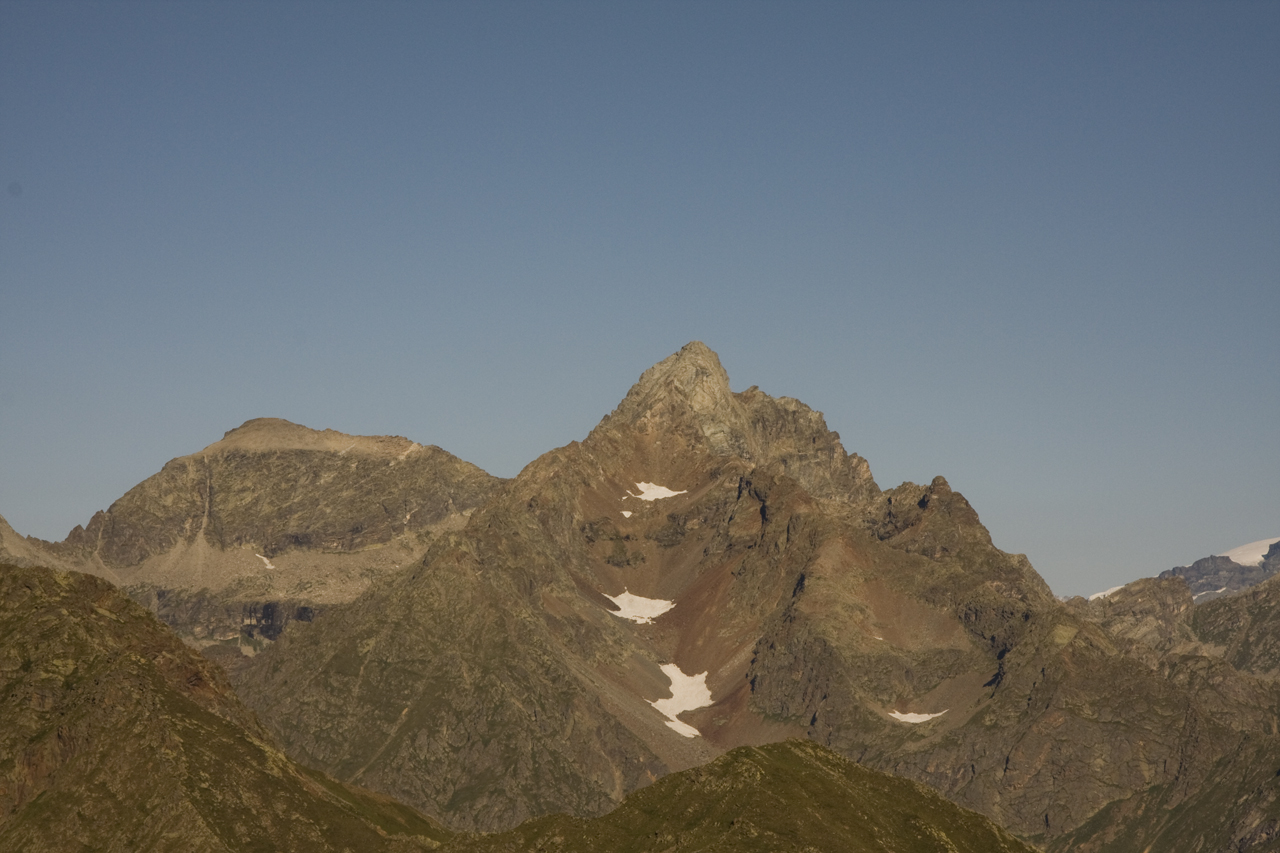 Il Corno Bianco dalla Sivella